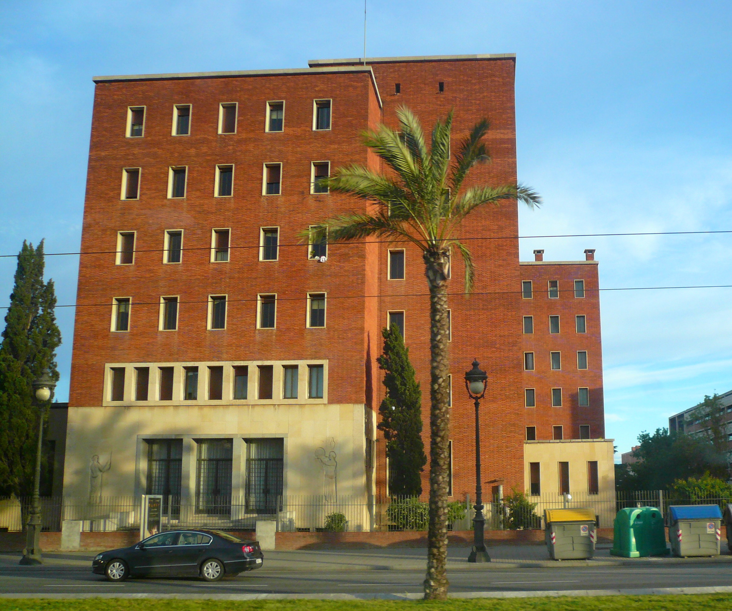 Un dels edificis del Col·legi Major Penyafort-Montserrat, vist des de la Diagonal. És l'edifici de la dreta, que no recordo si és de l'antic col·legi Penyafort o el de l'antic col·legi Montserrat. A la foto s'hi veu també la catenària del Trambaix.